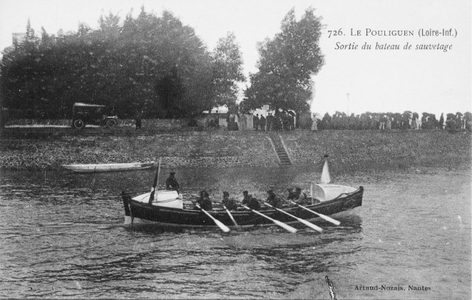 Le Pouliguen (Loire-Atlantique - France) : sortie du bateau de sauvetage